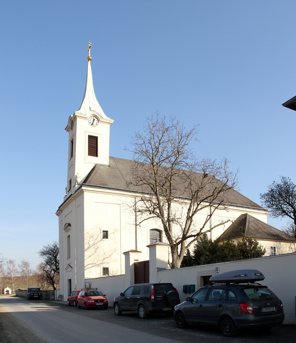 Katholische Pfarrkirche hl. Michael in Haselbach, ein Ortsteil der niederösterreichischen Gemeinde Niederhollabrunn.